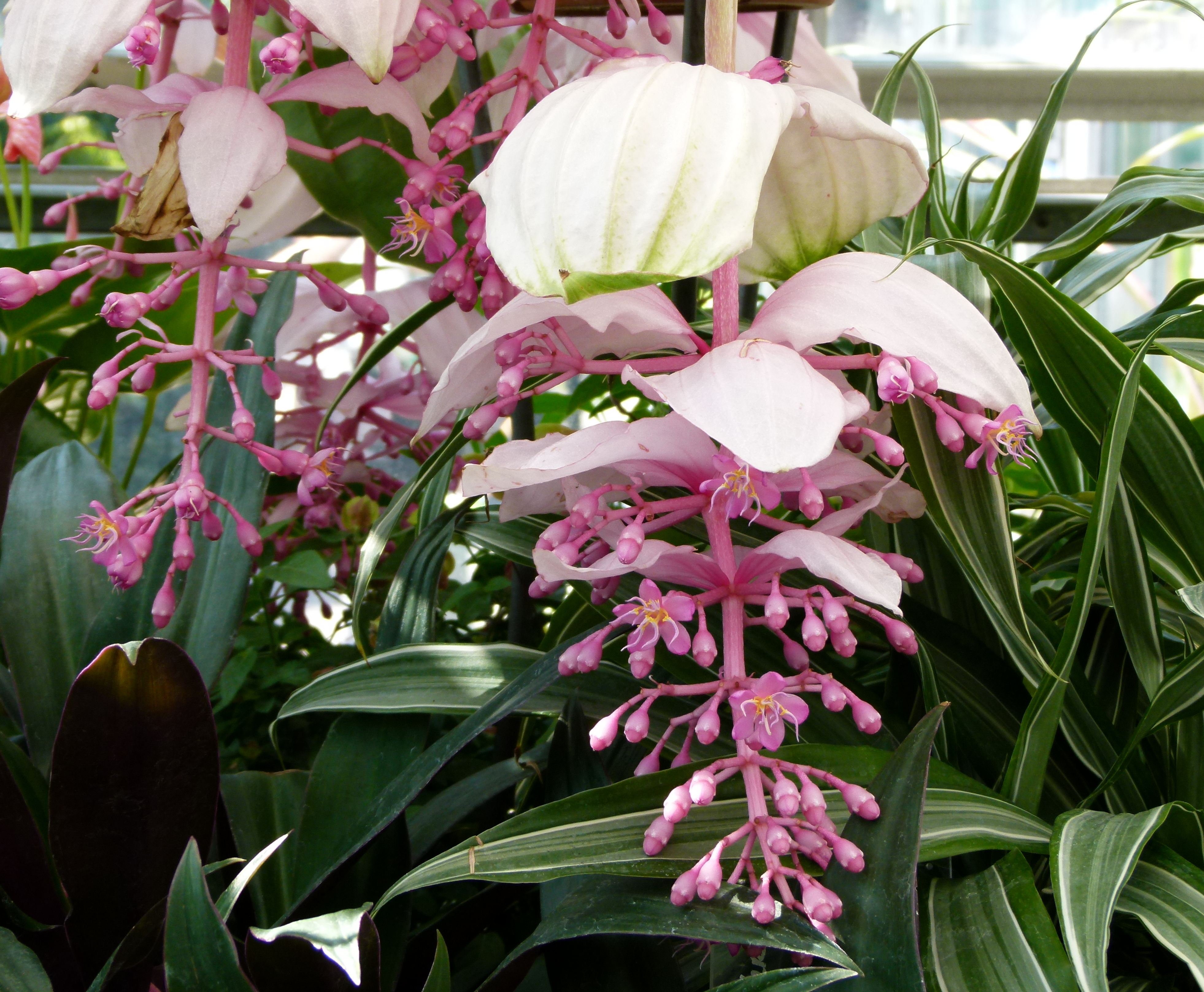 Pink flower unidentified plant